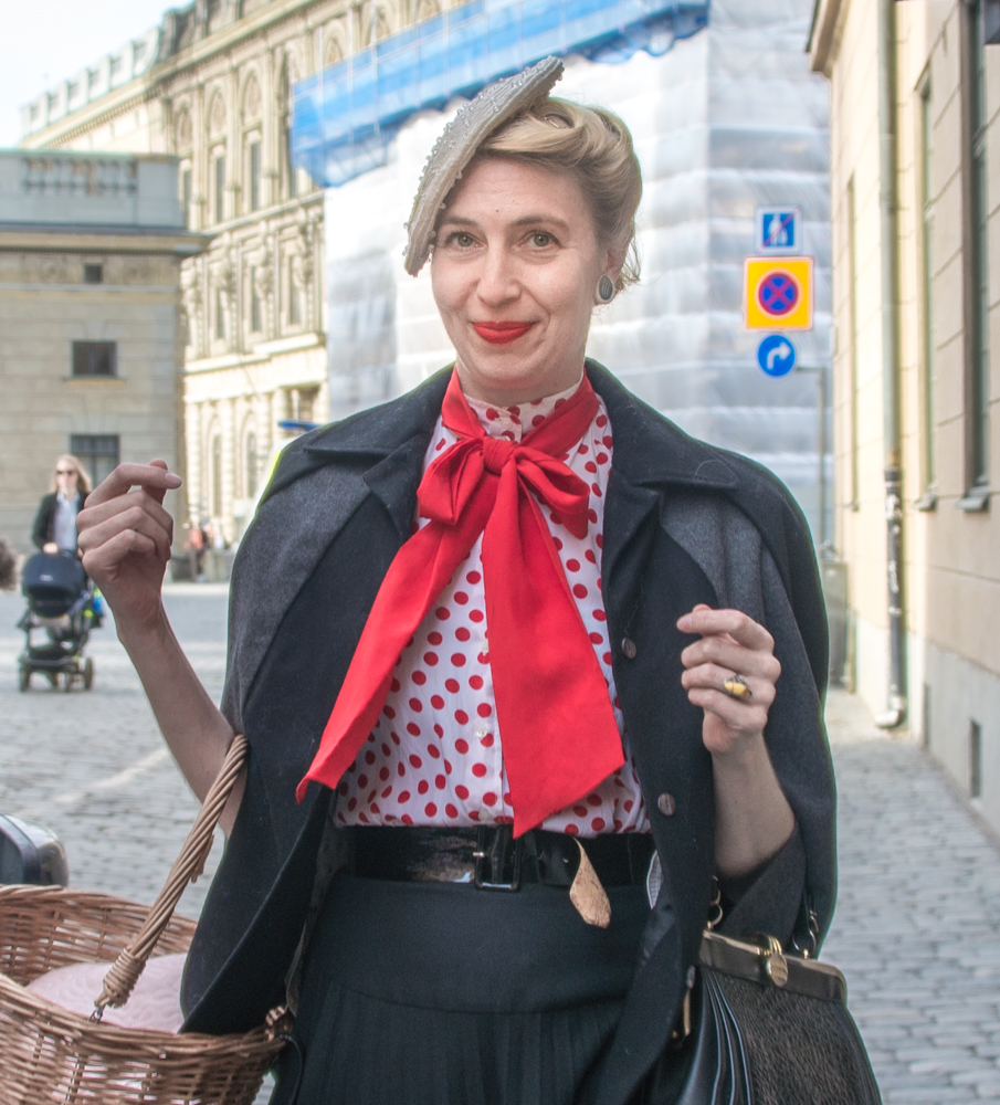 Knytblusdam på väg till manifestation för stöd till Sara Danius på Stortorget i Gamla stan i Stockholm den 19 april 2018. Kvinnan passerar just utanför Börshusets entré till Svenska Akademien.